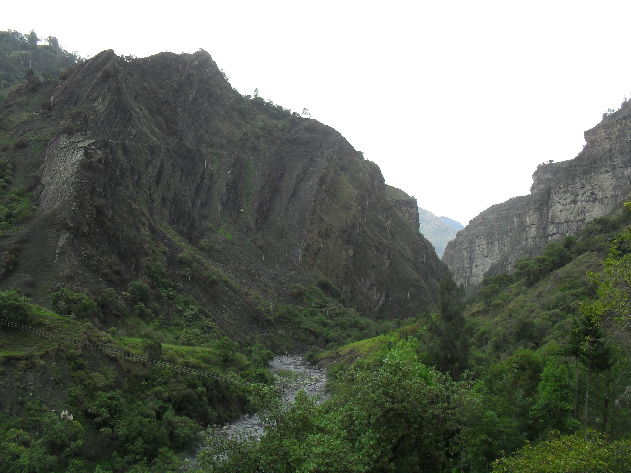 Peña de Chiscas sobre el río Chiscano, municipio de Chiscas, departamento de Boyacá, Colombia